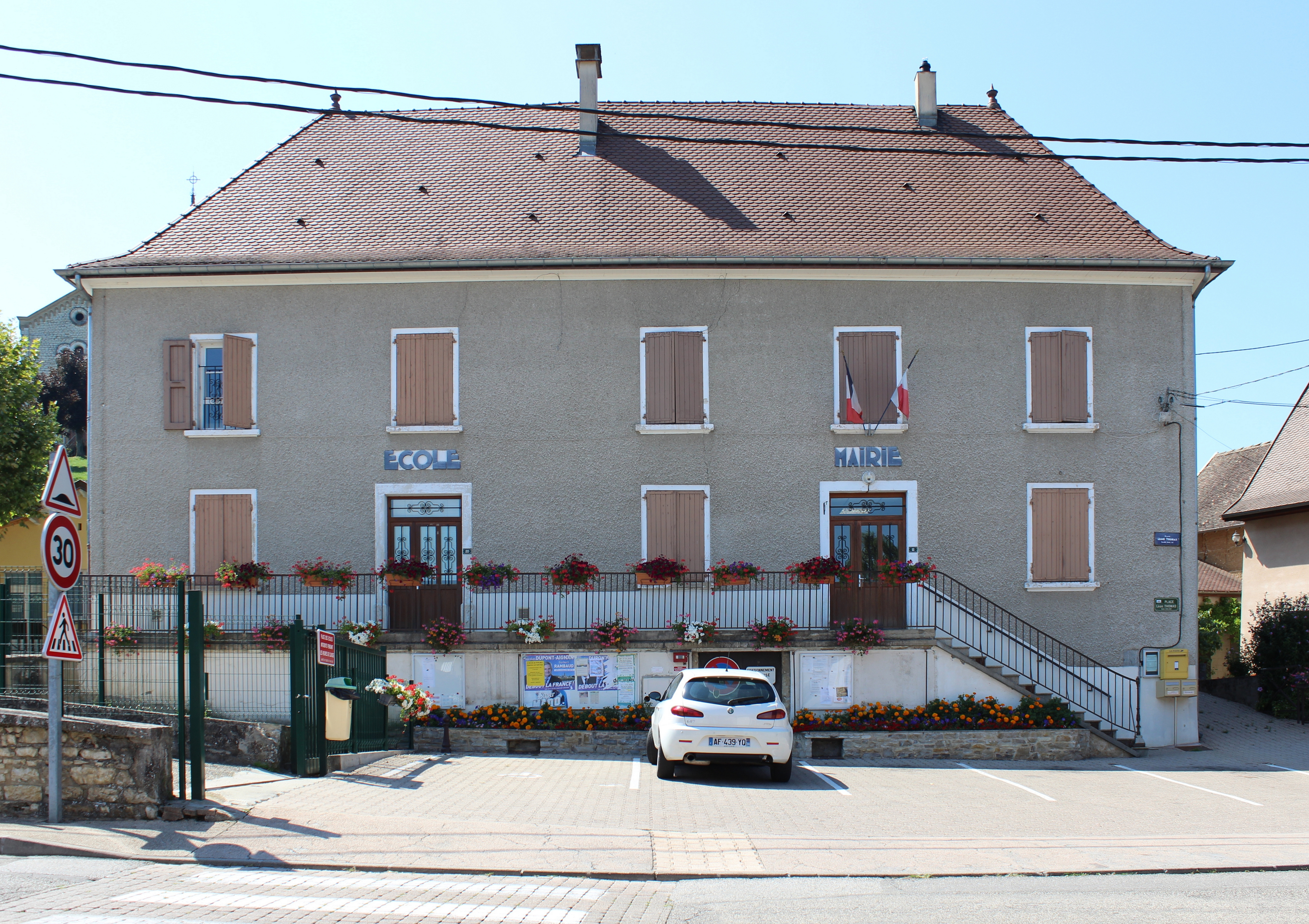 La mairie de Passins.